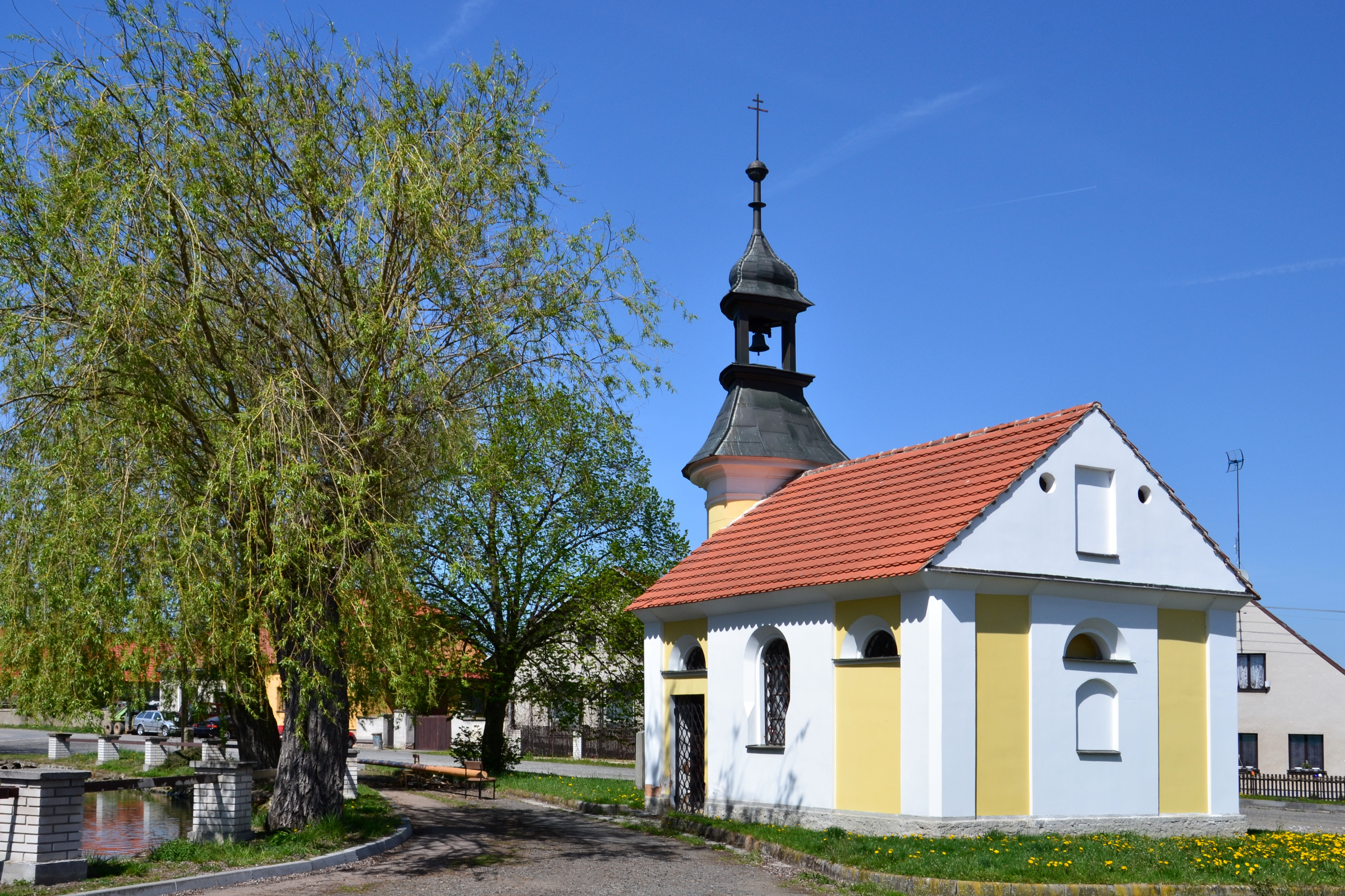 Nadryby – kaple svatého Antonína Paduánského (pohled z jihovýchodu)